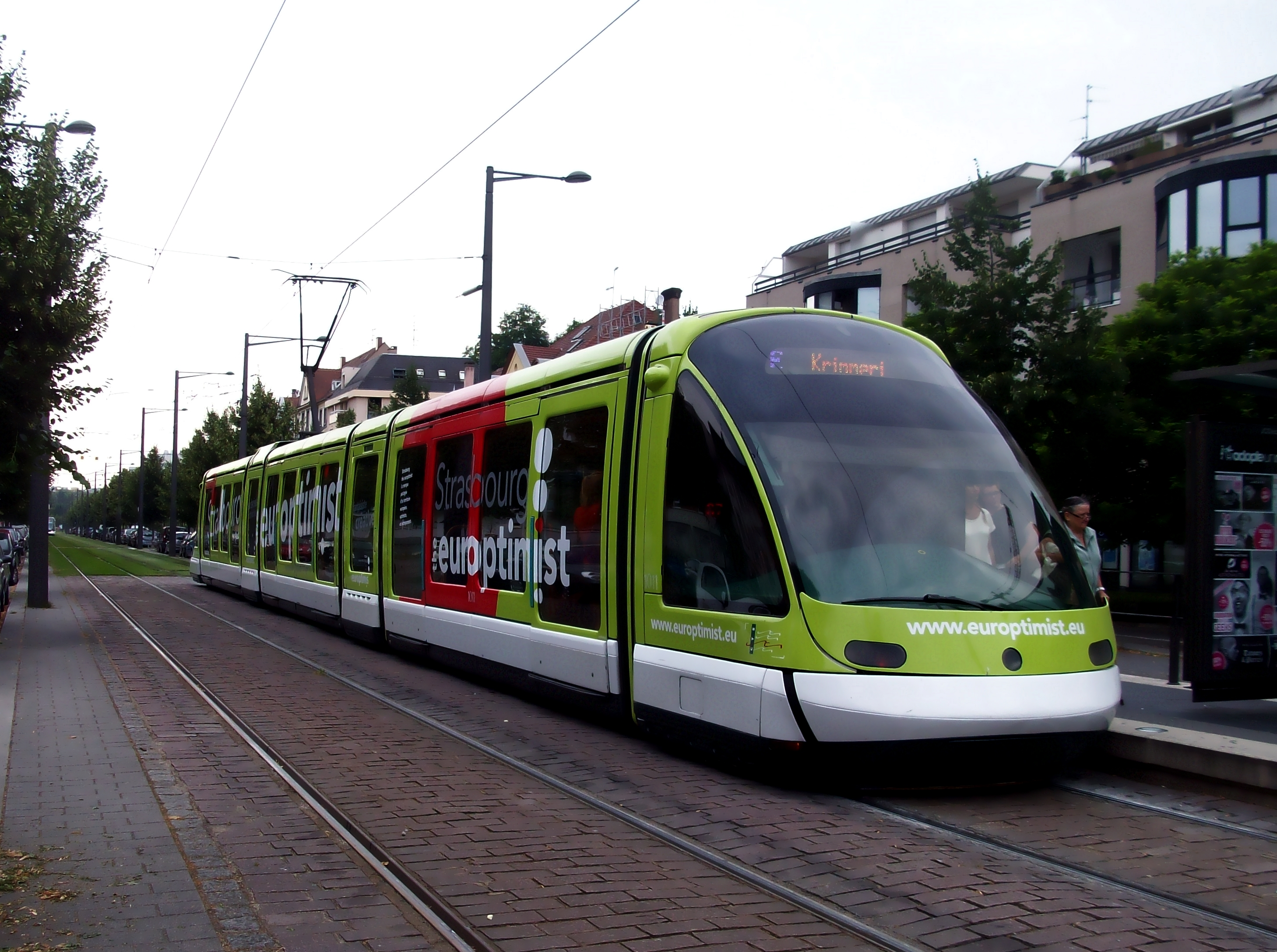 Rame Eurotram pelliculé aux couleurs Europtimist à Landsberg.